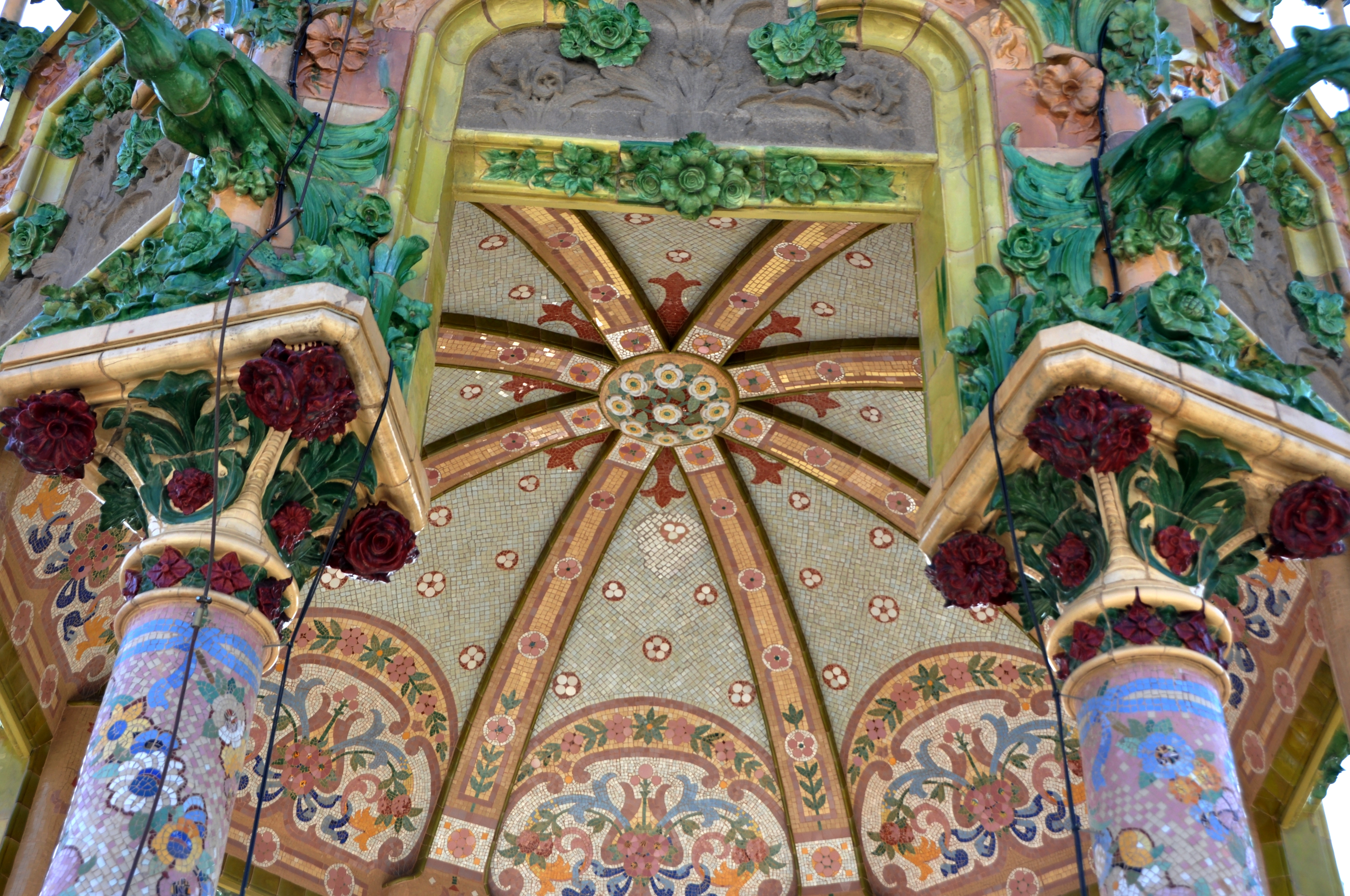 Barcelona (Kennedy square). La Rotonda. 1906. Adolf Ruiz, architect. Lluís Bru, mosaicist